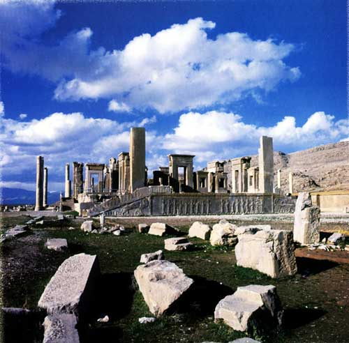 Les ruines de persepolis: Palais de Xerxès au premier plan et Apadana dans le fond image domaine public